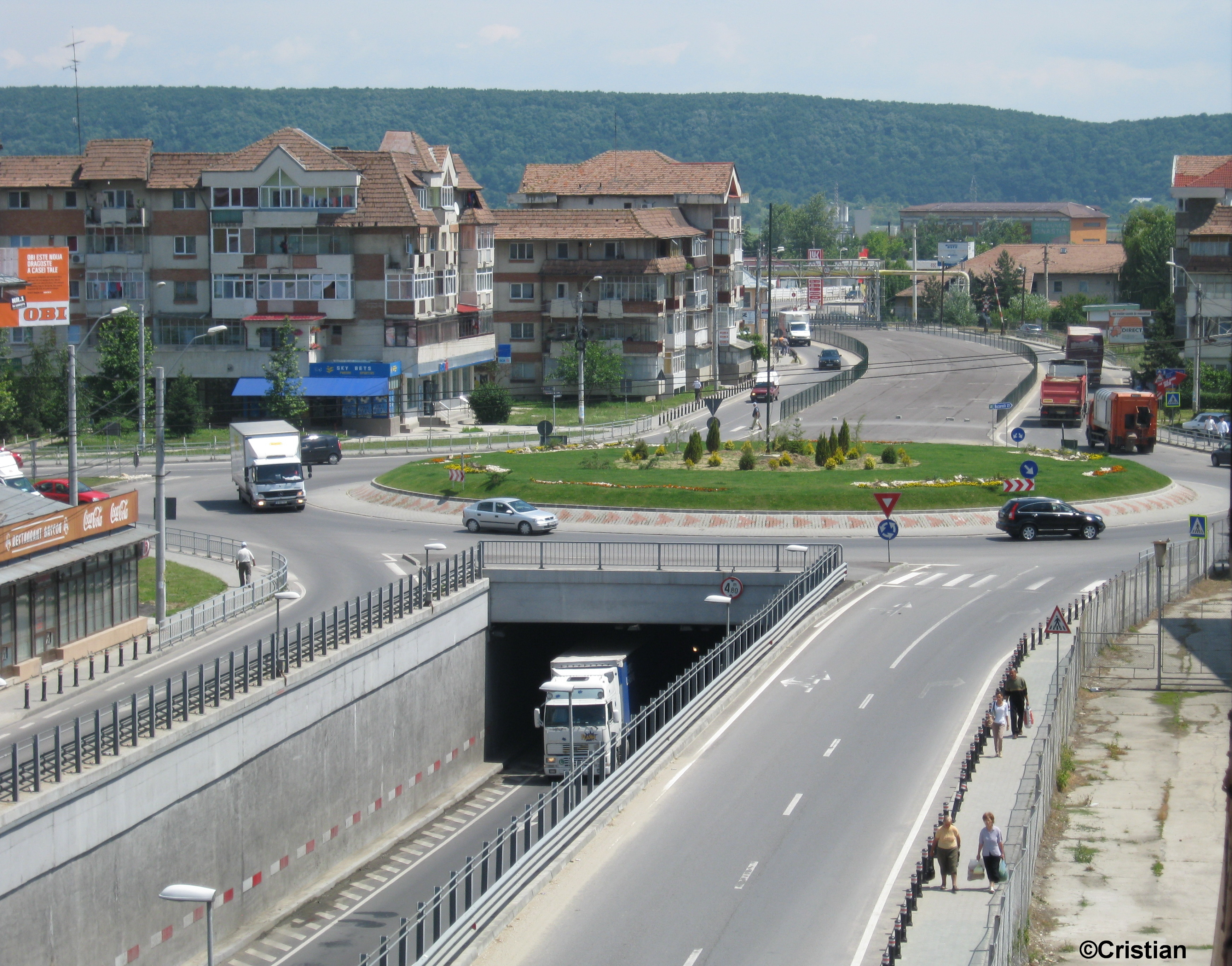 Bascov centru